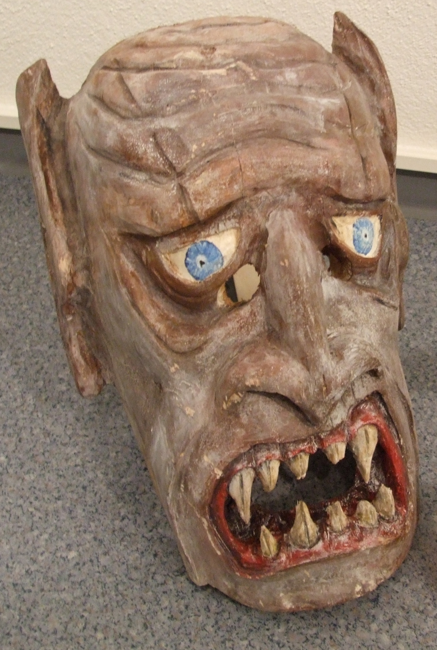 Krampusmaske, St. Johann im Pongau, Land Salzburg; aufgenommen bei der Jubiläumsausstellung des Fastnachtsmuseums Speyer